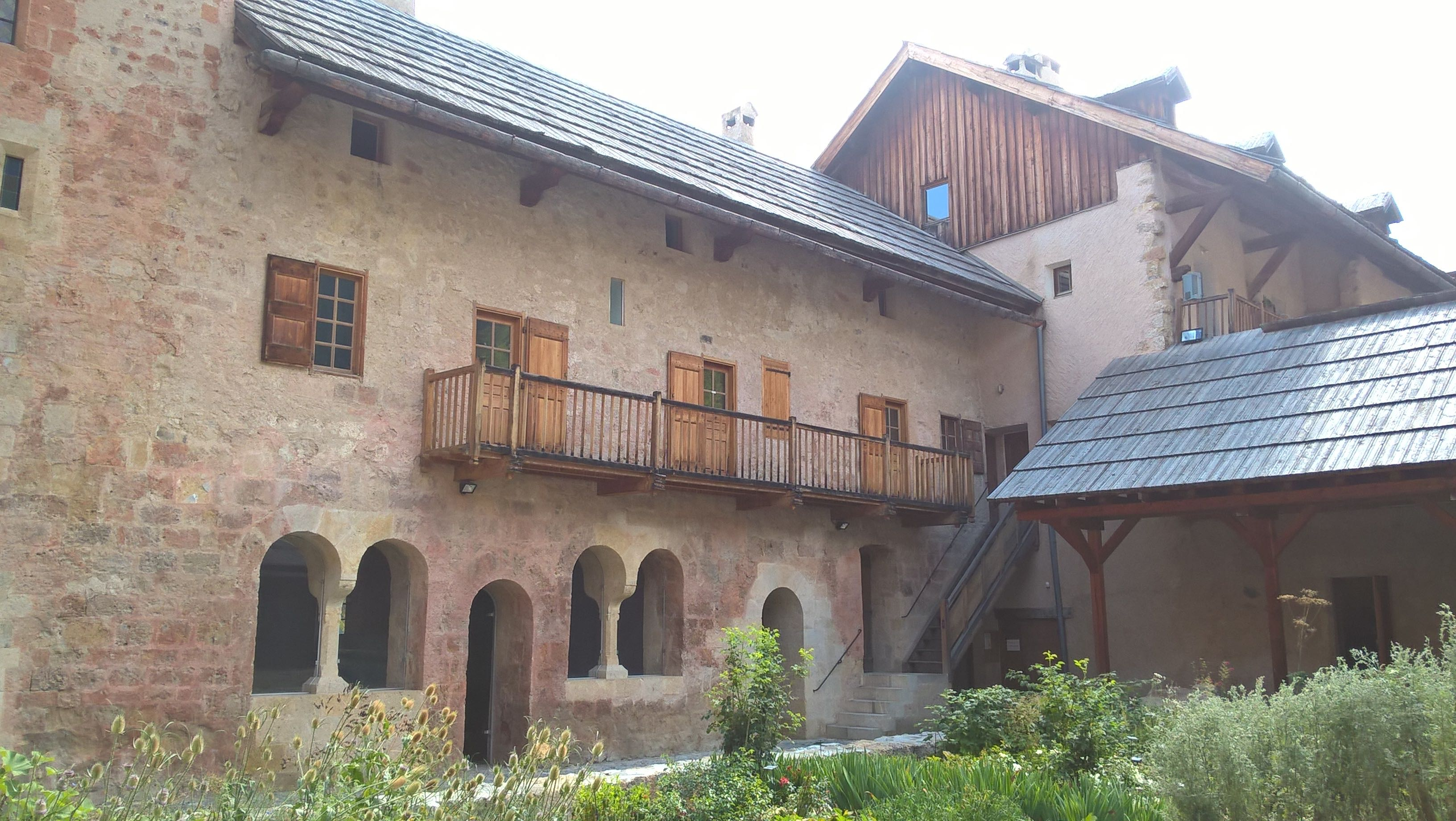 Abbaye Notre-Dame de Boscodon à Crots dans les Hautes-Alpes